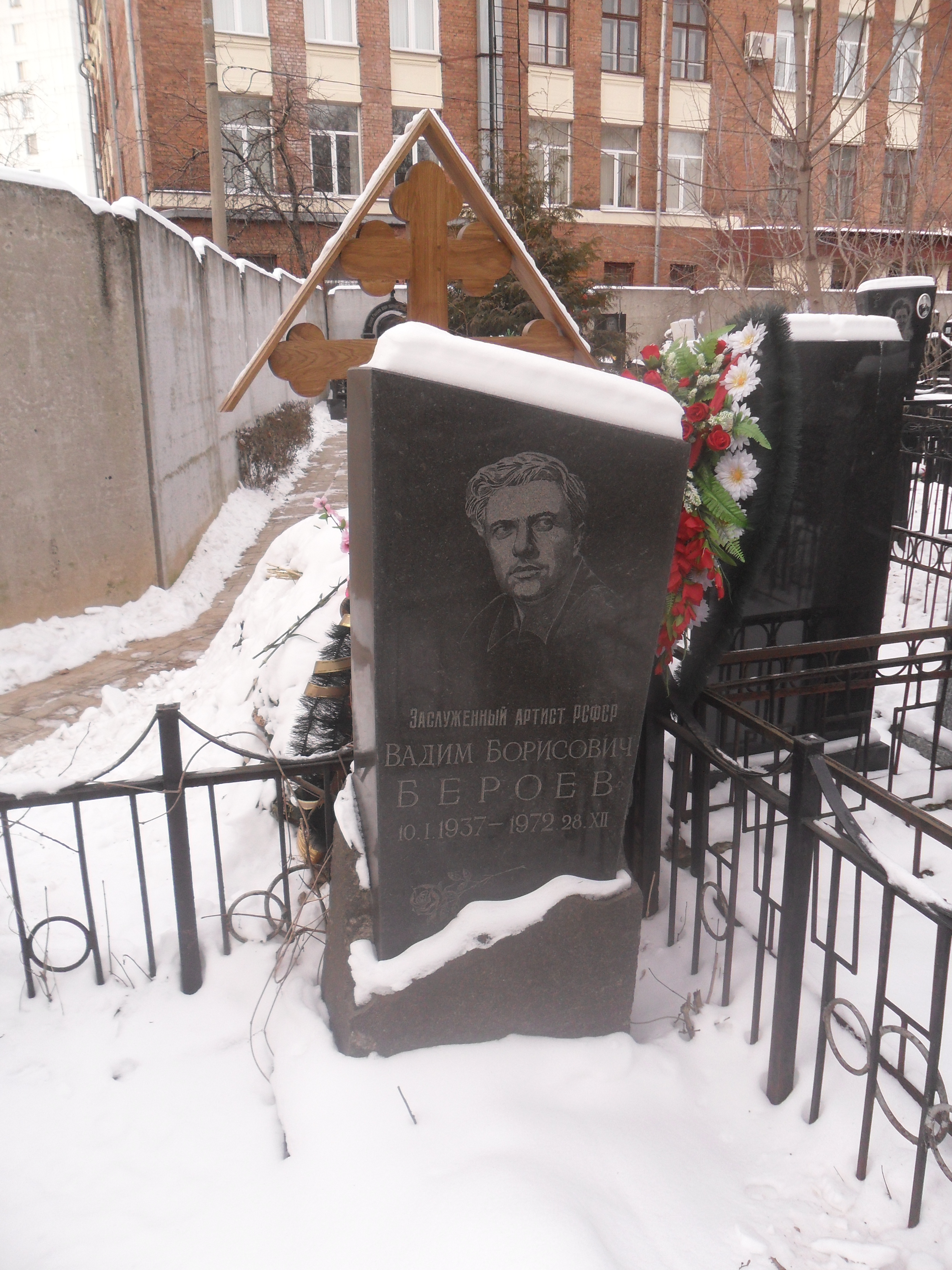 Могила актёра Вадима Бероева на Введенском кладбище Москвы.